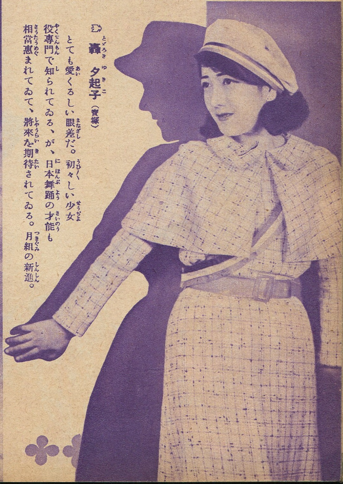 女優・轟夕起子の写真